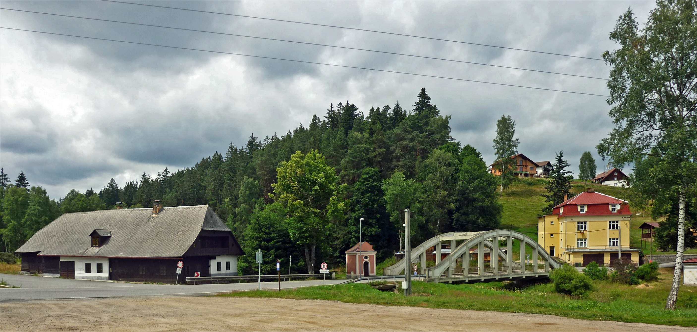 Moldaubrücke in Obermoldau (Horní Vltavice) in Südböhmen